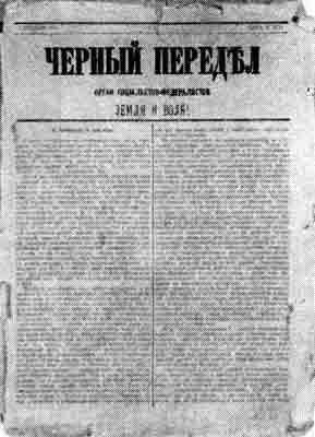 Periodico « Cёrnyj peredel » (Чёрный Передел, uscito dal 1880 al 1881)